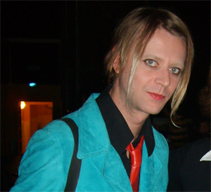 Andrea Fumagalli, in arte Andy (Bluvertigo) dj-set Fillmore 17 febbraio 2007